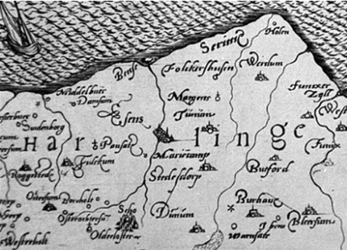 Ausschnitt der Ostfriesland-Karte von Ubbo Emmius